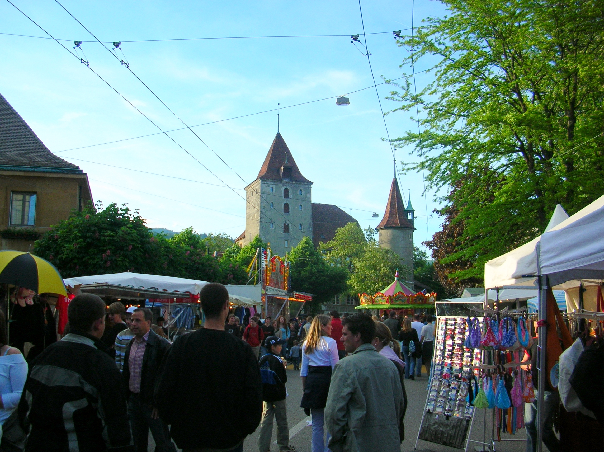 Stedlifest Nidau